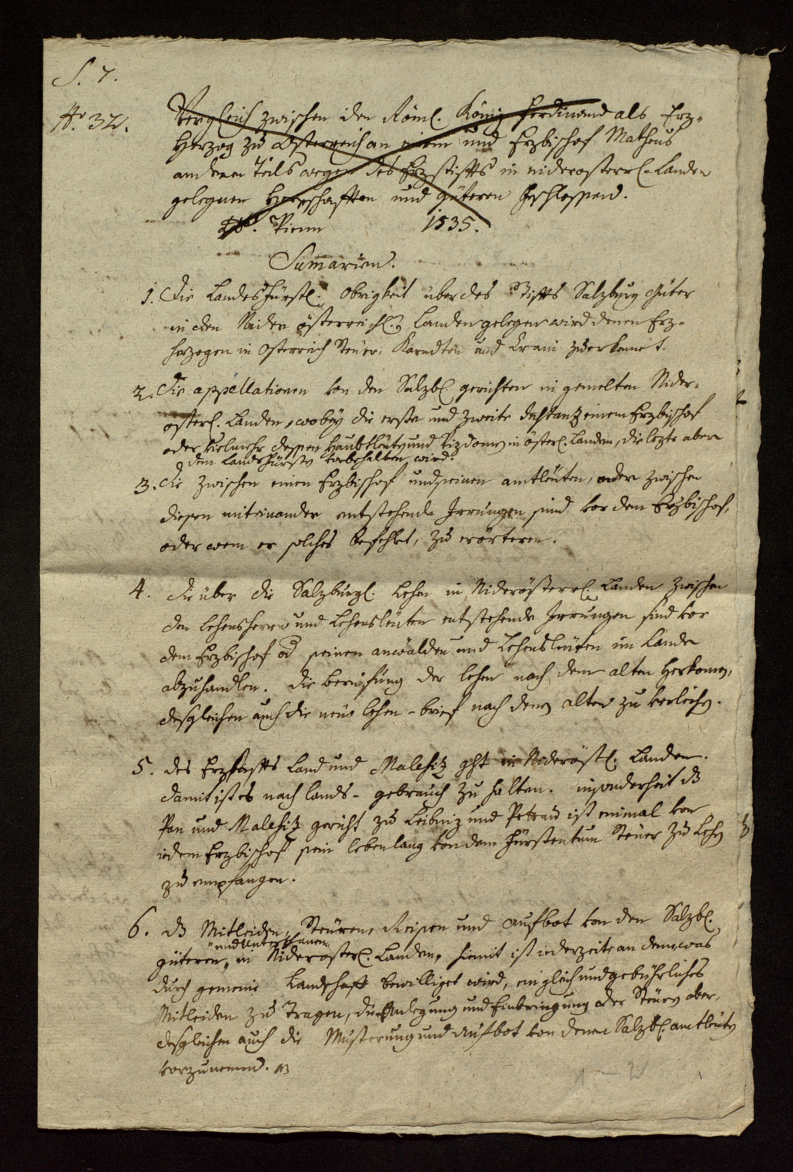 Rezess von Wien: Vertrag vom 25. Oktober 1535 zwischen dem Fürsterzbistum Salzburg und den Habsburgern als Herrschern im damaligen Österreich über die Souveränitätsrechte Salzburgs in seinen Exklaven in Innerösterreich.